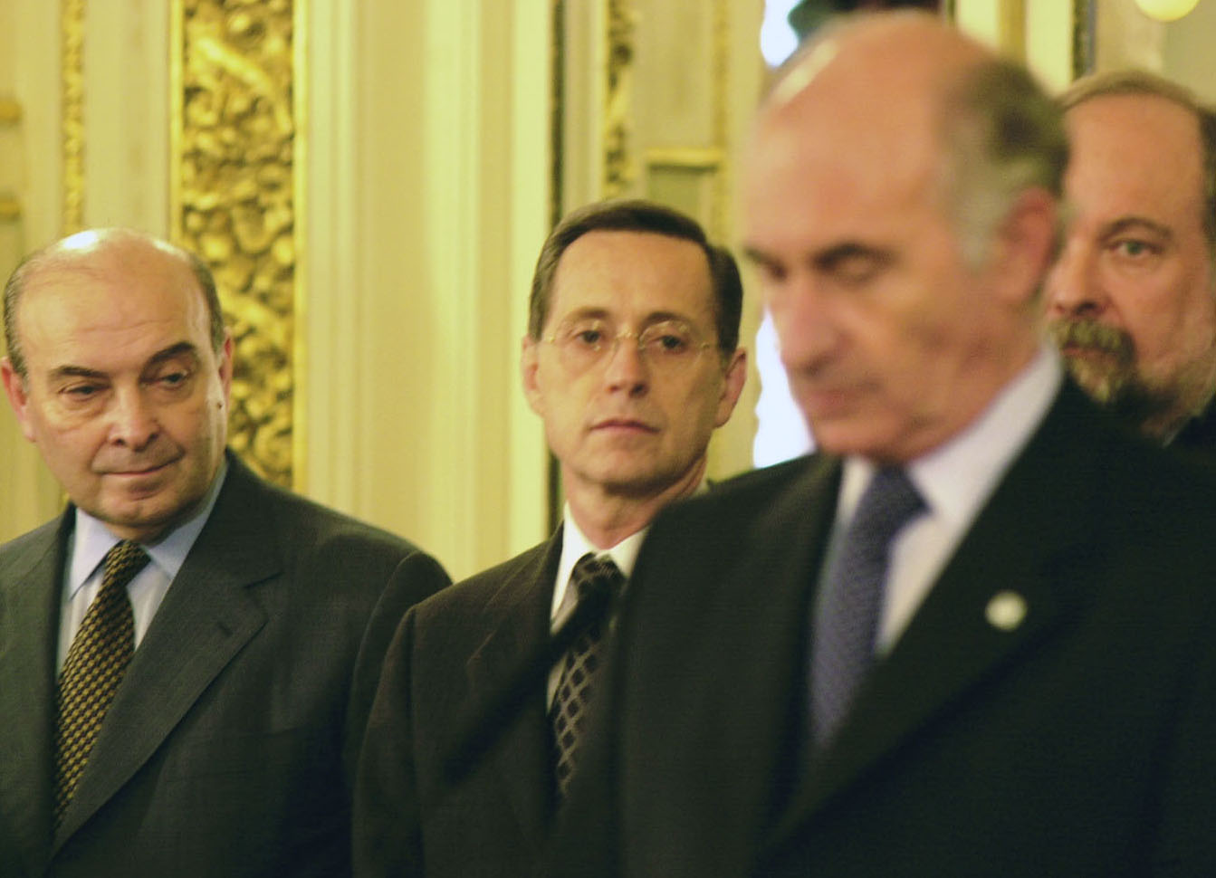 Fernando De La Rua junto a su gabinete en el Salon blanco de la Casa Rosada